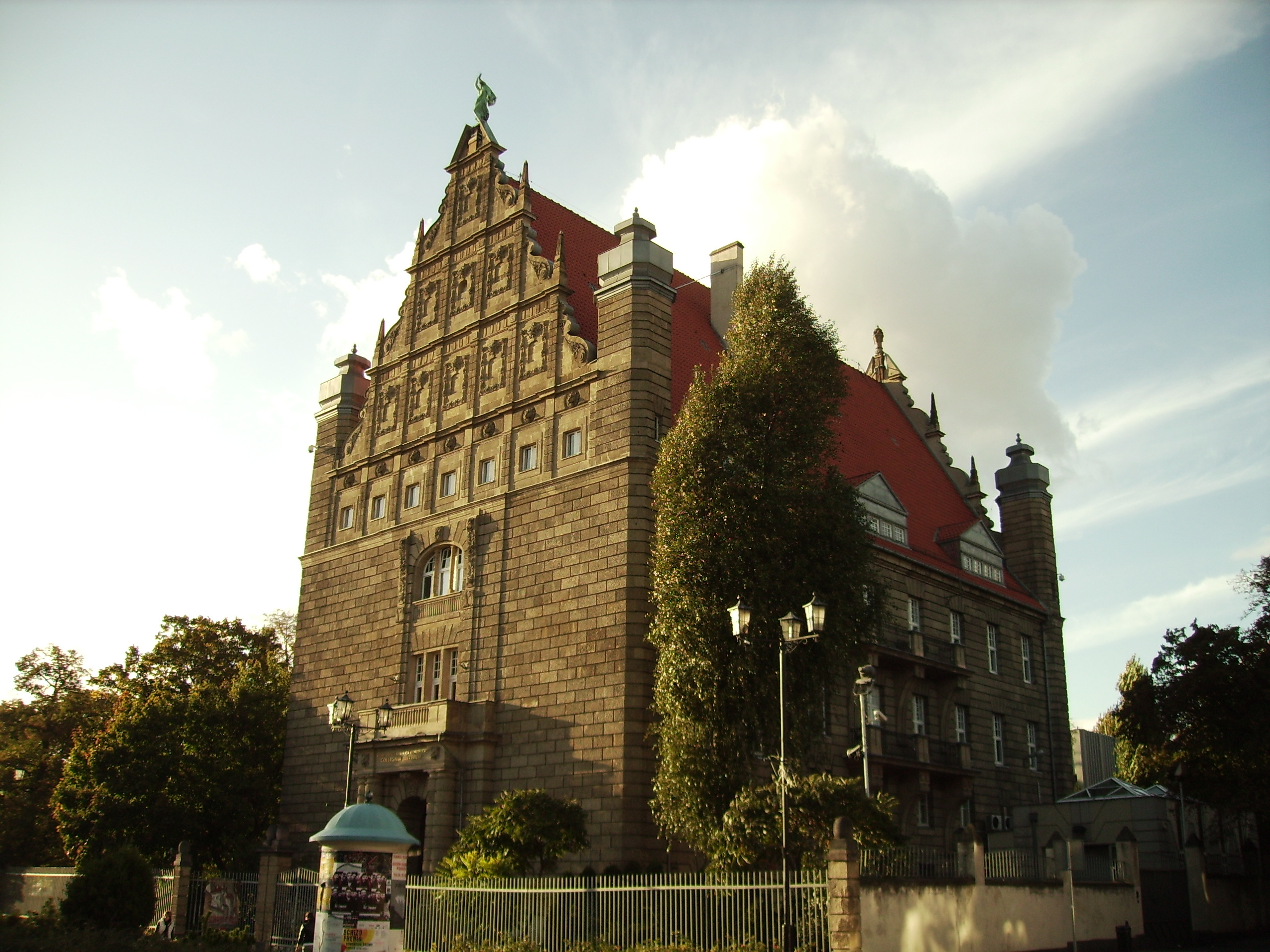 UMK w Toruniu